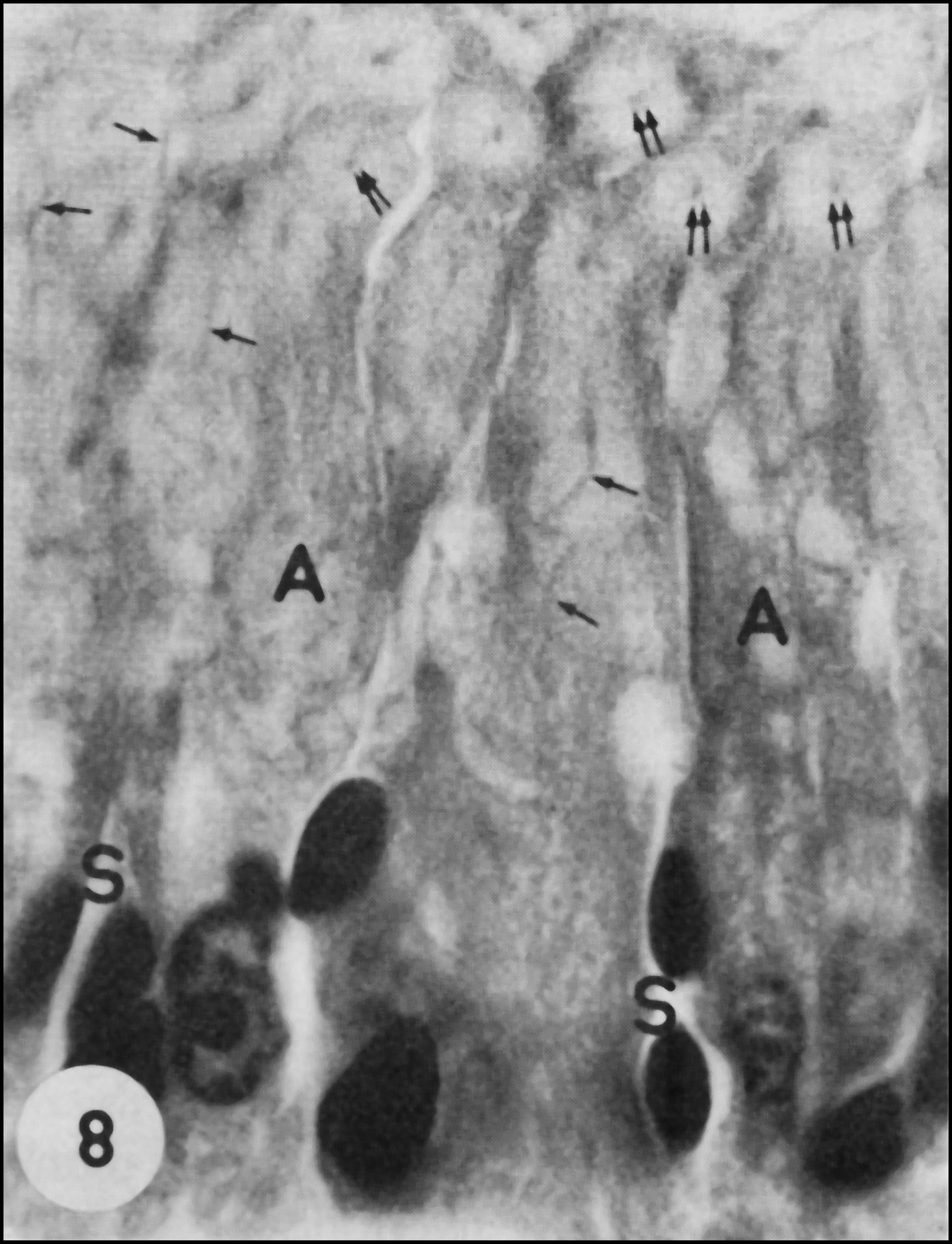 Uroctea durandi, organe pharyngien dit "du gout", coupe histologique, détails des adénocytes avec leurs canalicules et cellules satellites.